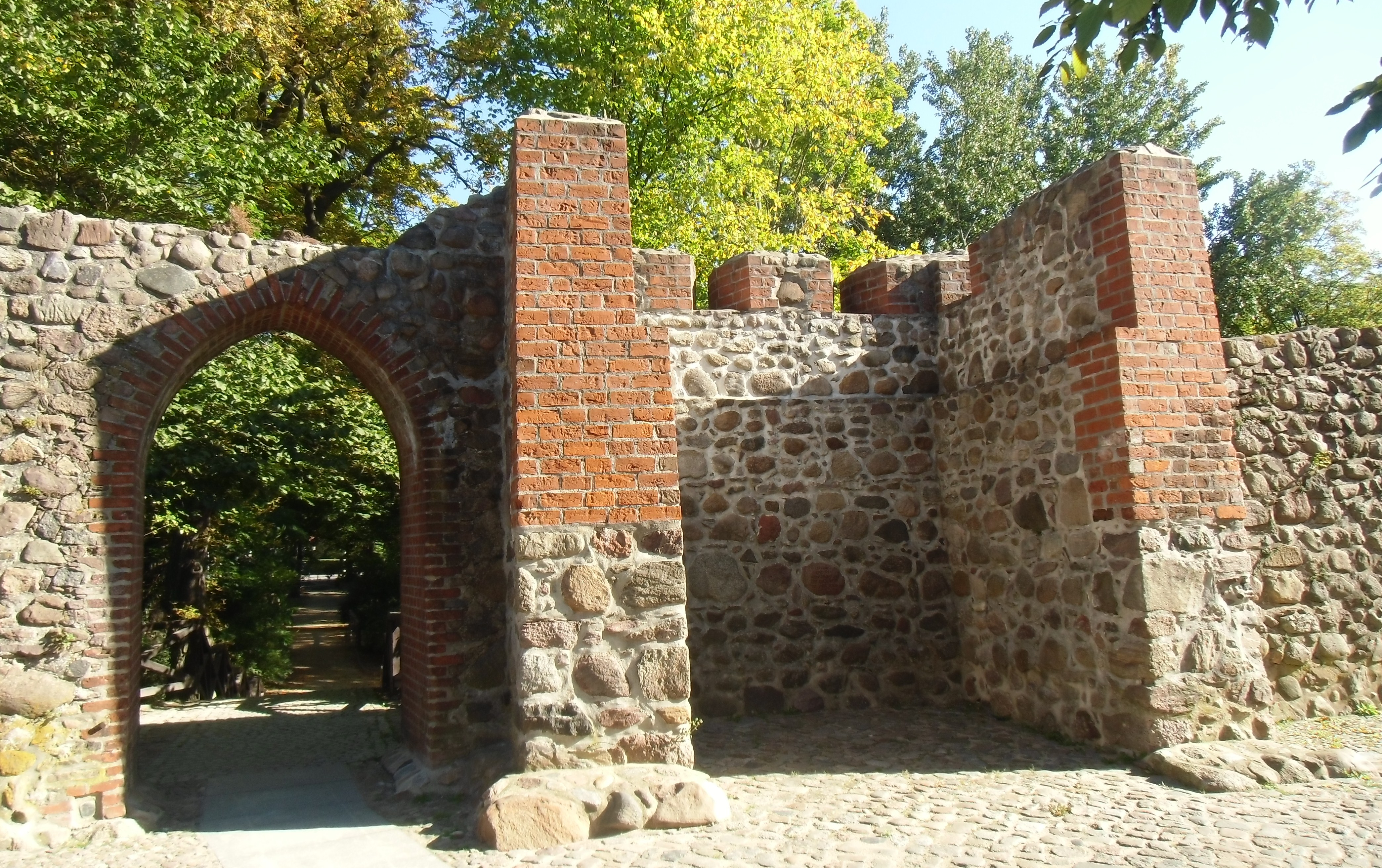 Teil der rekonstruierten mittelalterlichen Stadtmauer von Bernau bei Berlin, steht unter Denkmalschutz